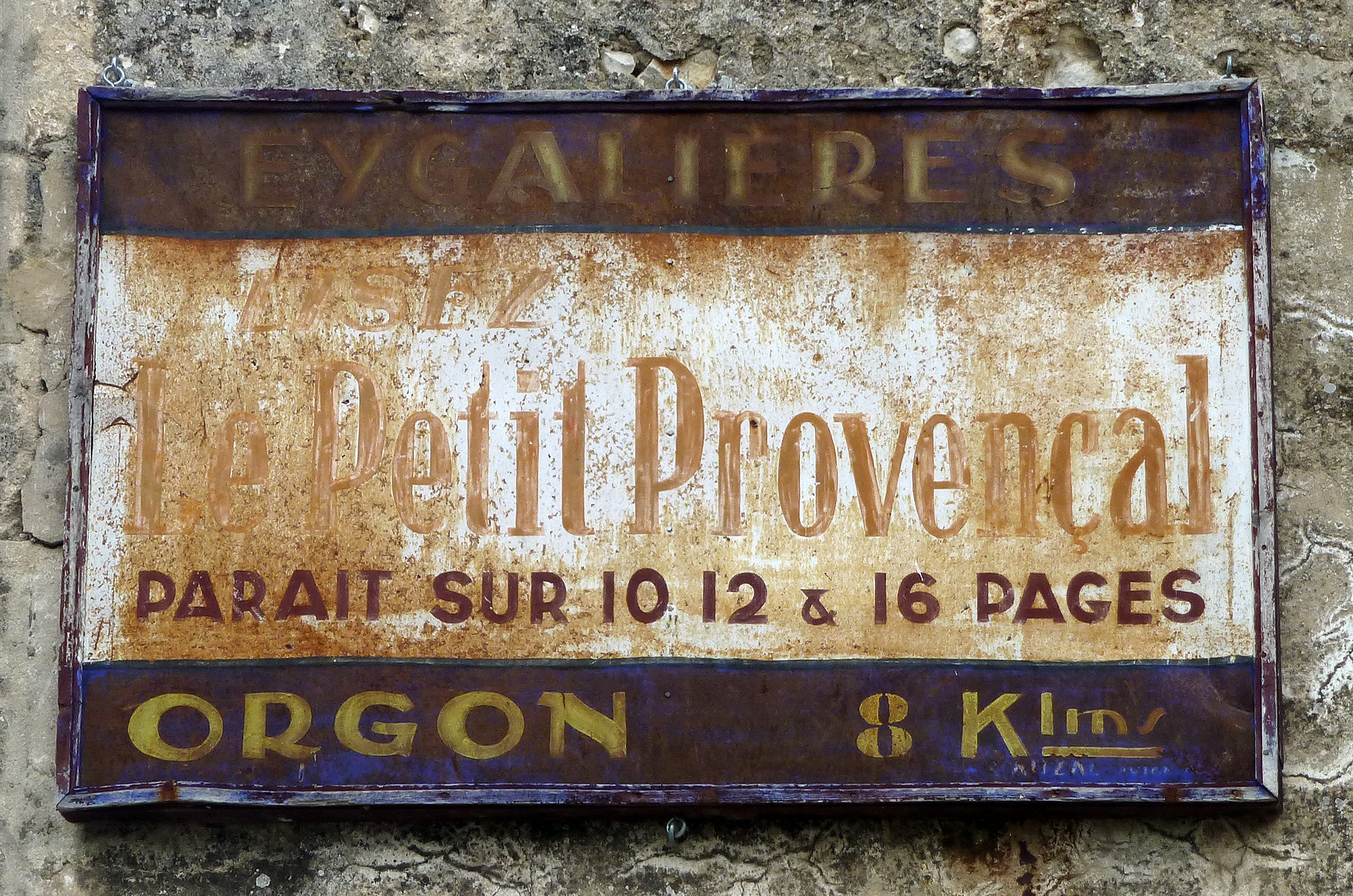 Historisches Reklameschild für die Marseiller Tageszeitung Le Petit Provencal